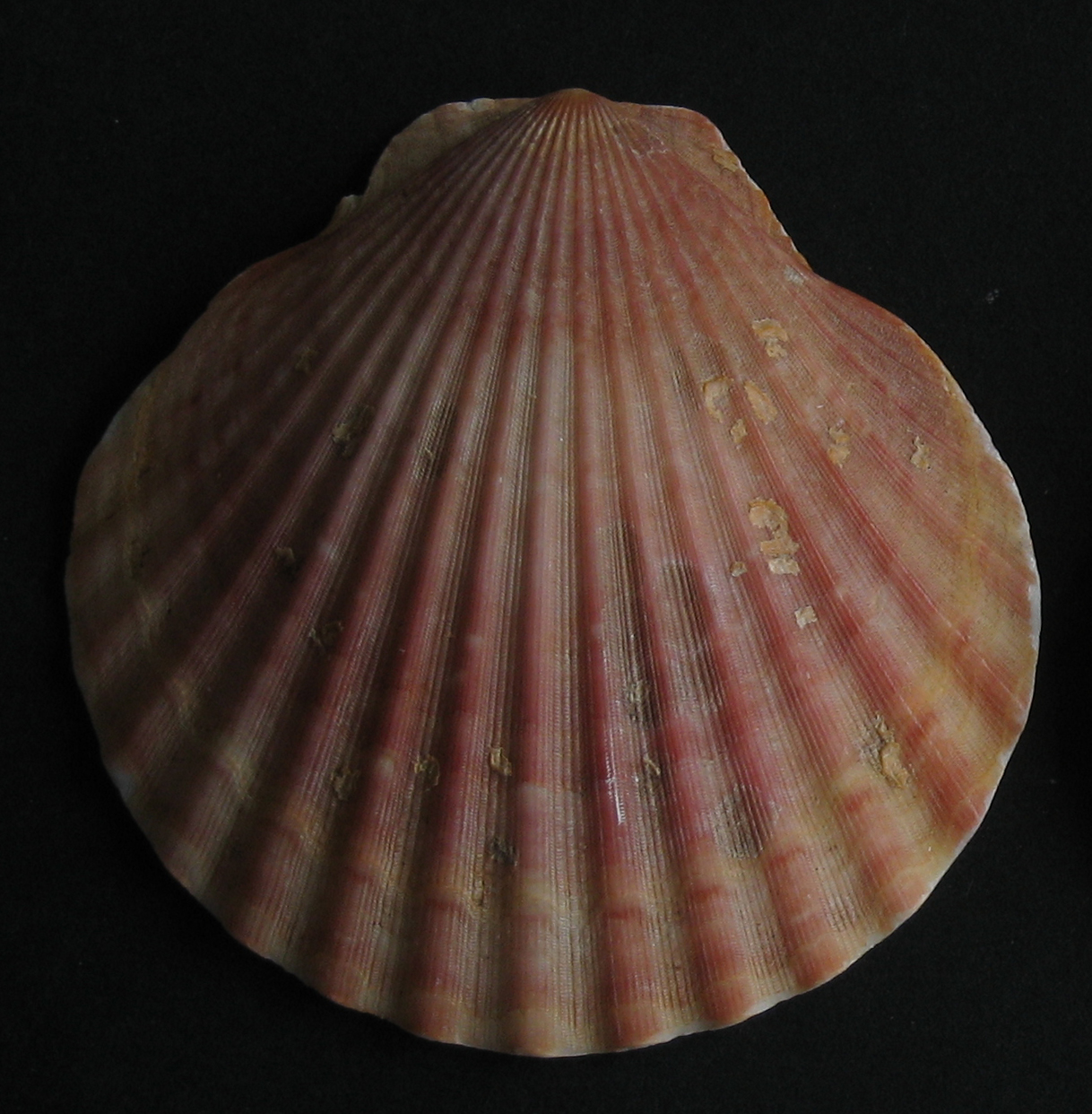 Aequipecten opercularis - kleine Pilgermuschel